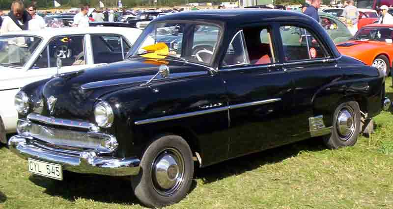 Vauxhall Velox 4-Door Saloon 1955